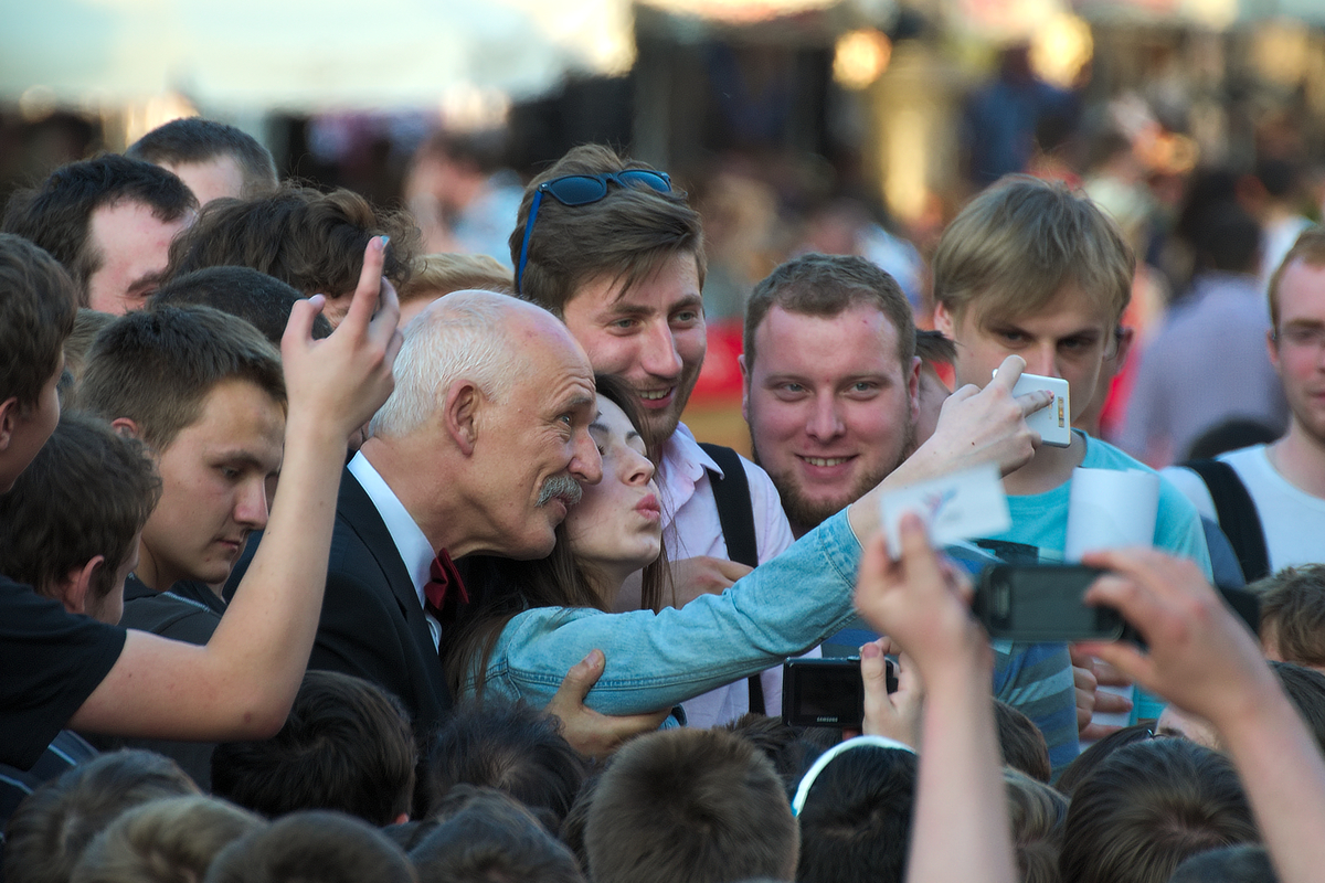 Selfie z Januszem Korwin-Mikke